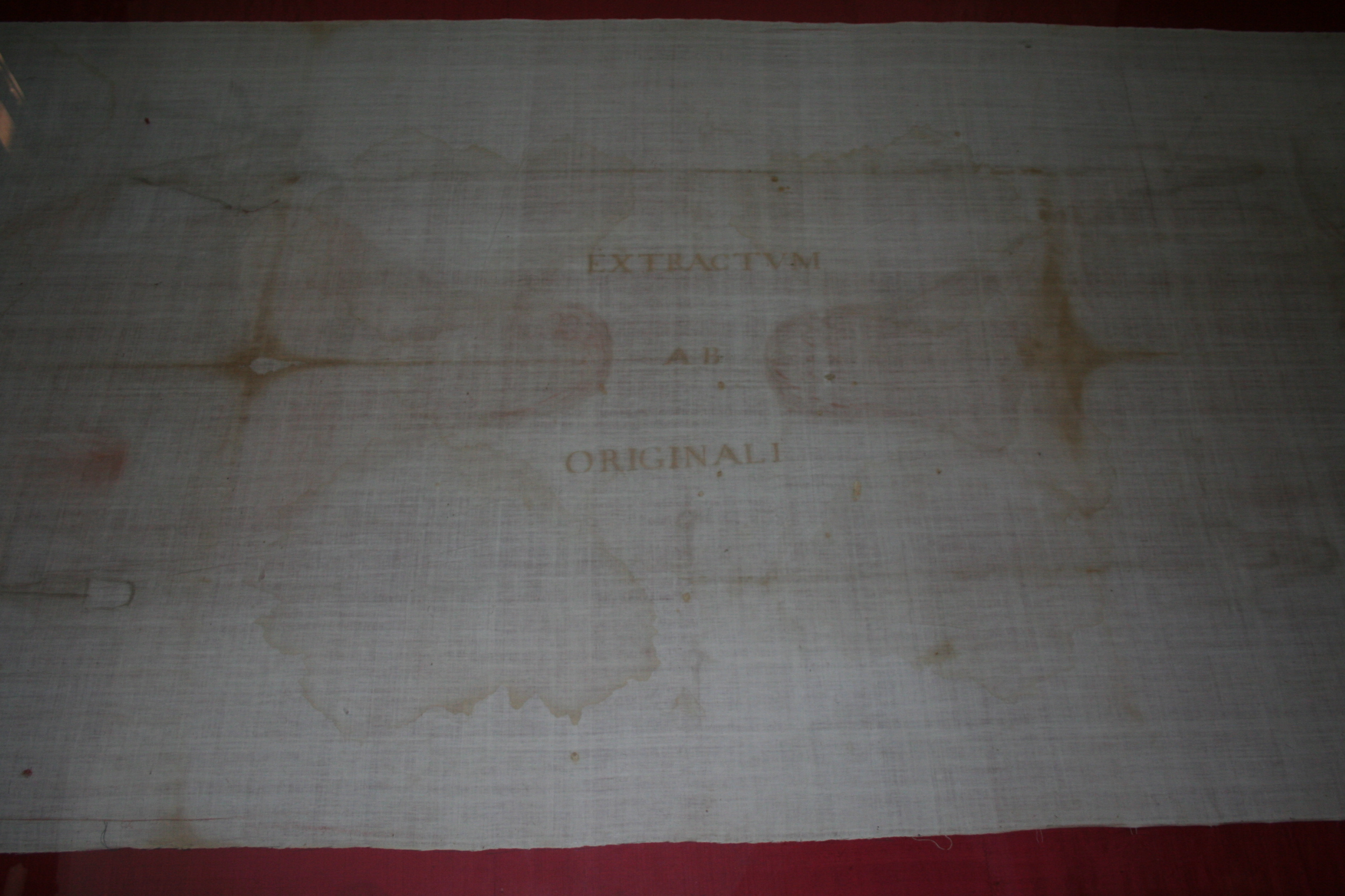 Chiesa di San Francesco di Arquata del Tronto, interno, particolare della copia della Sacra Sindone con impressa la scritta in stampatello "extractum ab originali"